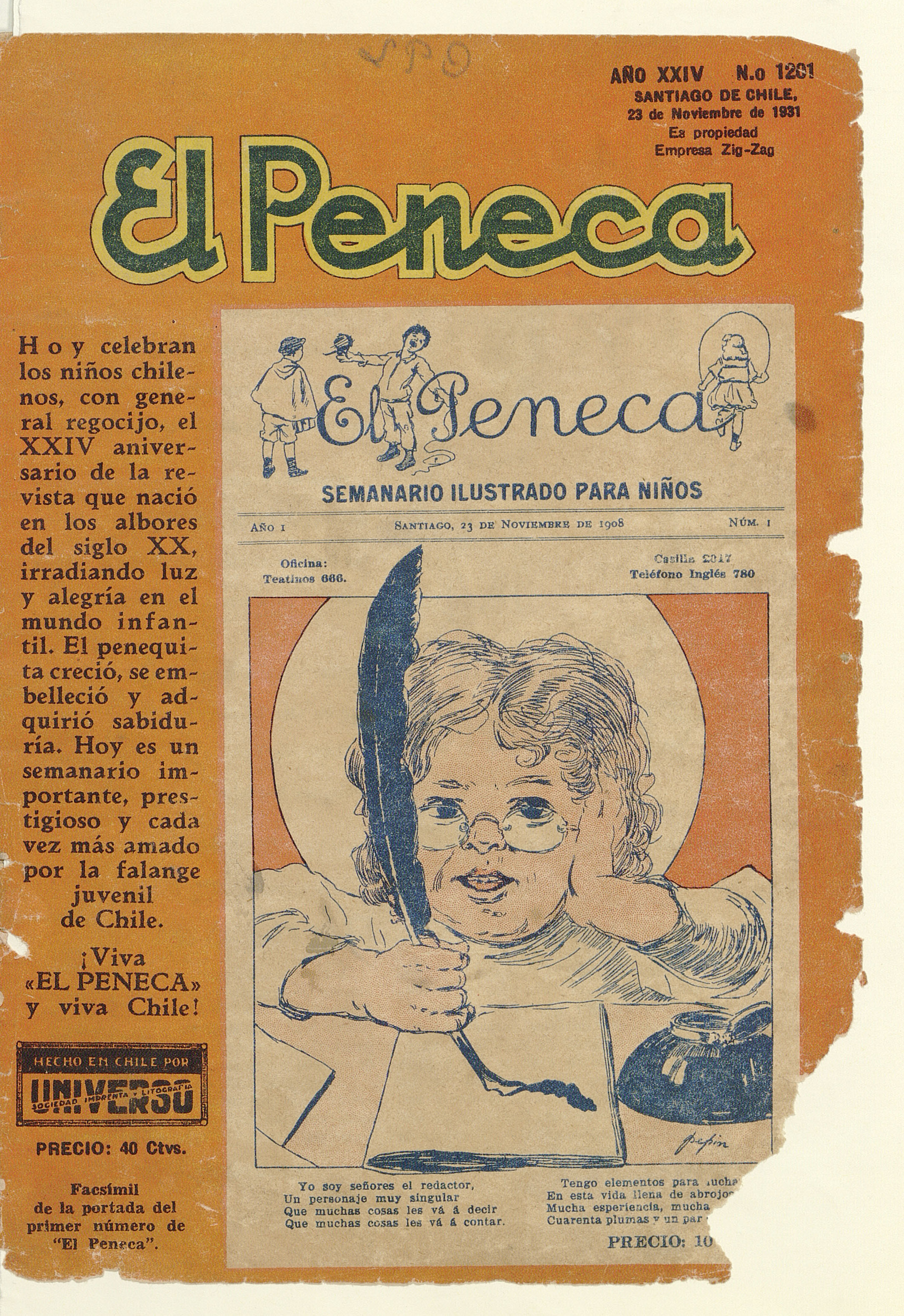 Portada de la revista El Peneca de 1934 en donde celebran el 24° aniversario de la revista con la primera portada del llamado "Semanario ilustrado para niños". El Peneca: año 24, número 1201, 23 de noviembre de 1931